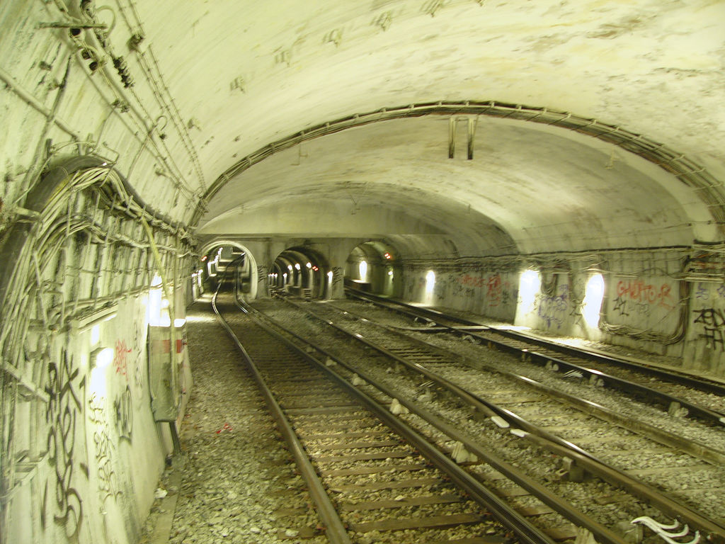 Metro de Paris tunnel pres de la station de Cluny